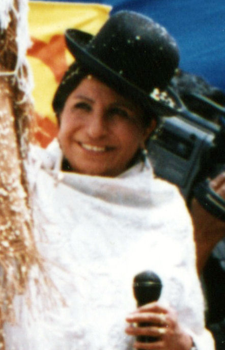 recorte de foto original File:Remedios y carlos.jpeg